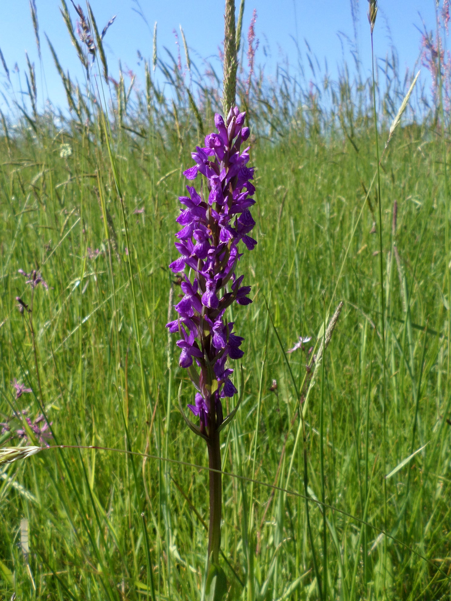 orchis élevé